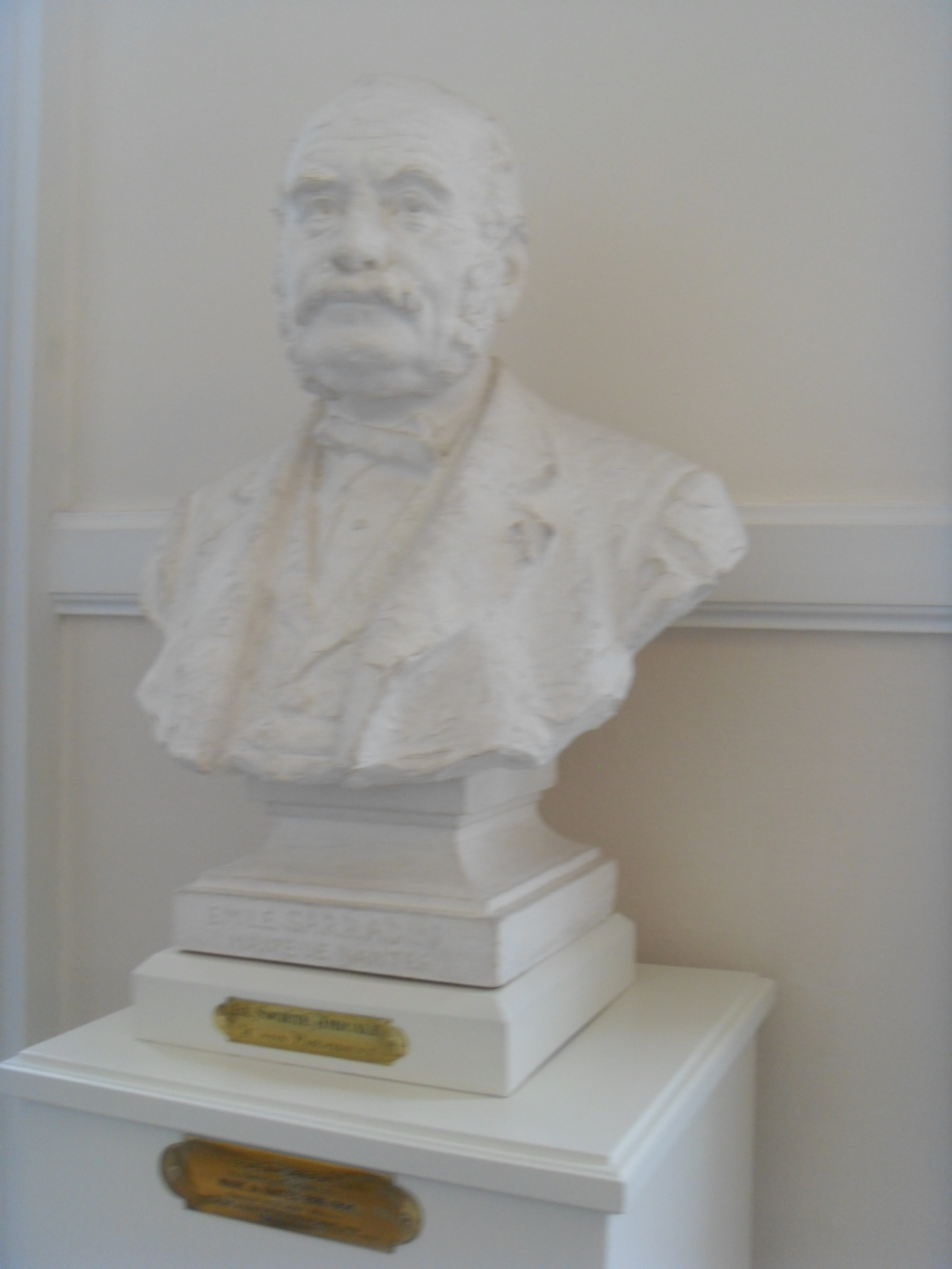 Buste Paul-Émile Sarradin